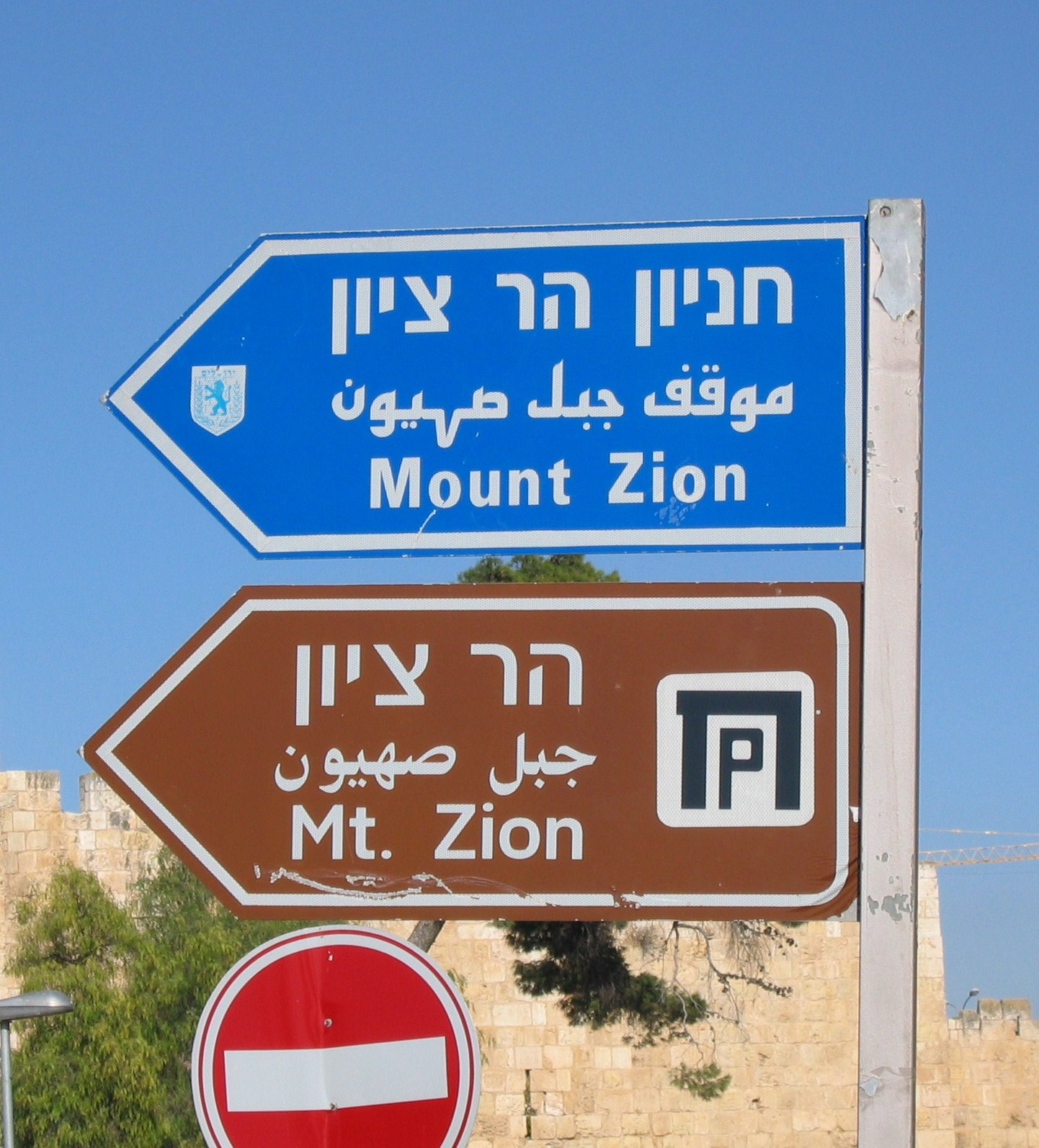 Пара дорожных указателей в Иерусалиме на иврите,арабском,английском. Средняя надпись на верхнем указателе сделана куфическим почерком, нижняя( (джабаль сахайюн) «гора Сион»)— насхом.